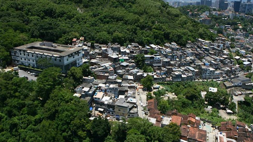 imagem aérea da favela tavares bastos